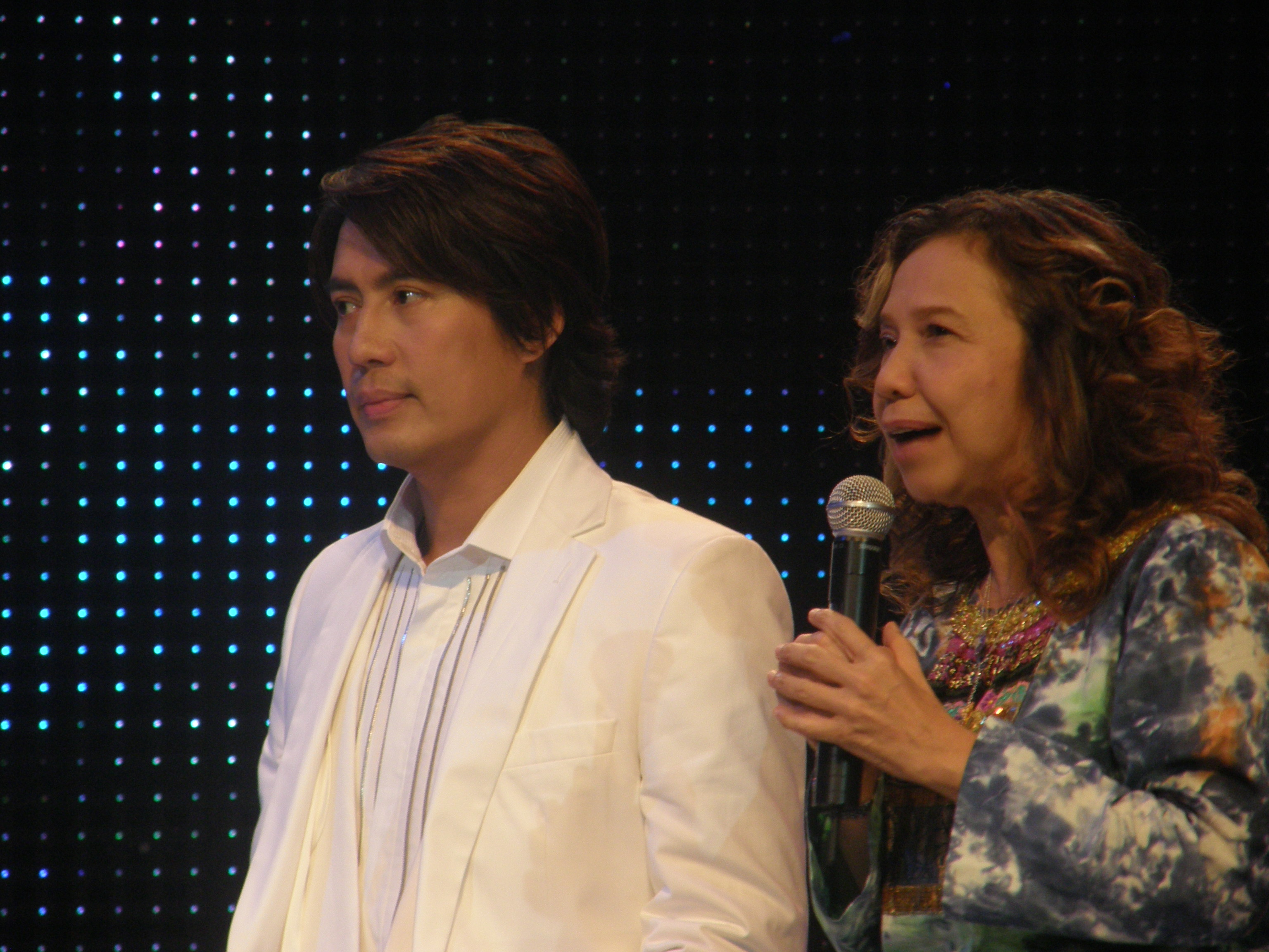 บุษบา ดาวเรือง ผู้จัดการเกี่ยวกับงานของ ธงไชย แมคอินไตย์